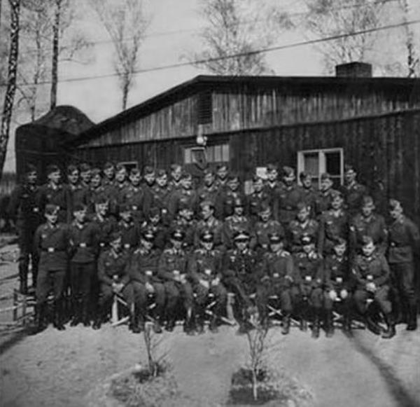 Praschnitz (Przasnysz) 1941r. Niemieccy żołnierze jednostki lotniczej na lotnisku